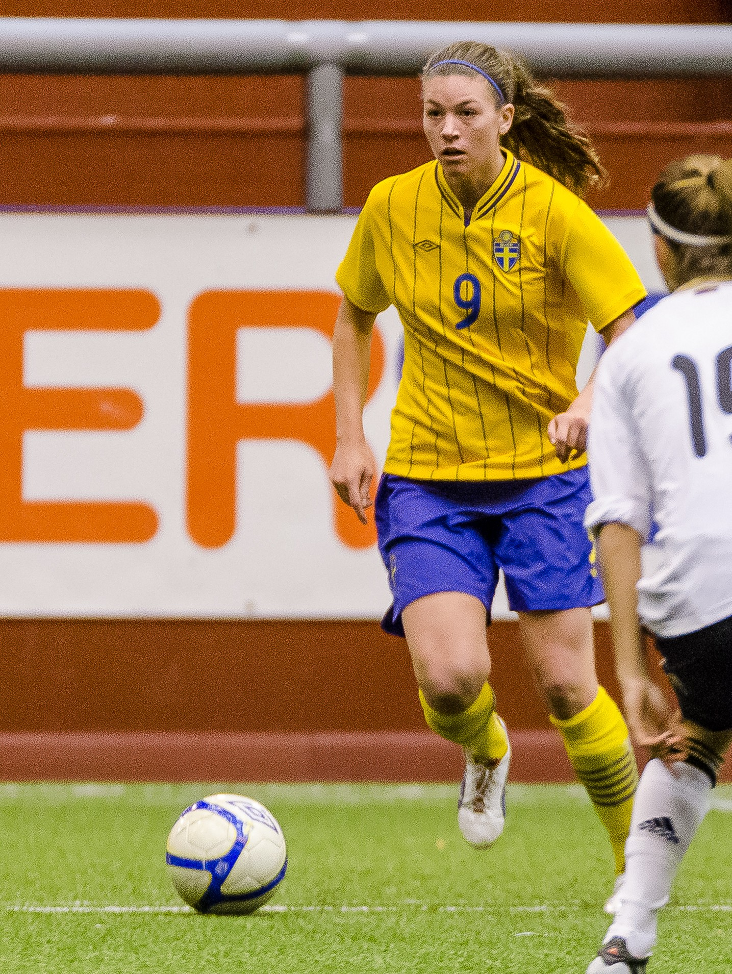 Pauline Hammarlund spelar F18-landskamp mellan Sverige och Tyskland i Växjö Tipshall, 21/11 2012.